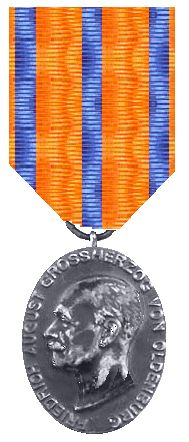 Kriegsverdienstmedaille Oldenburg 1917